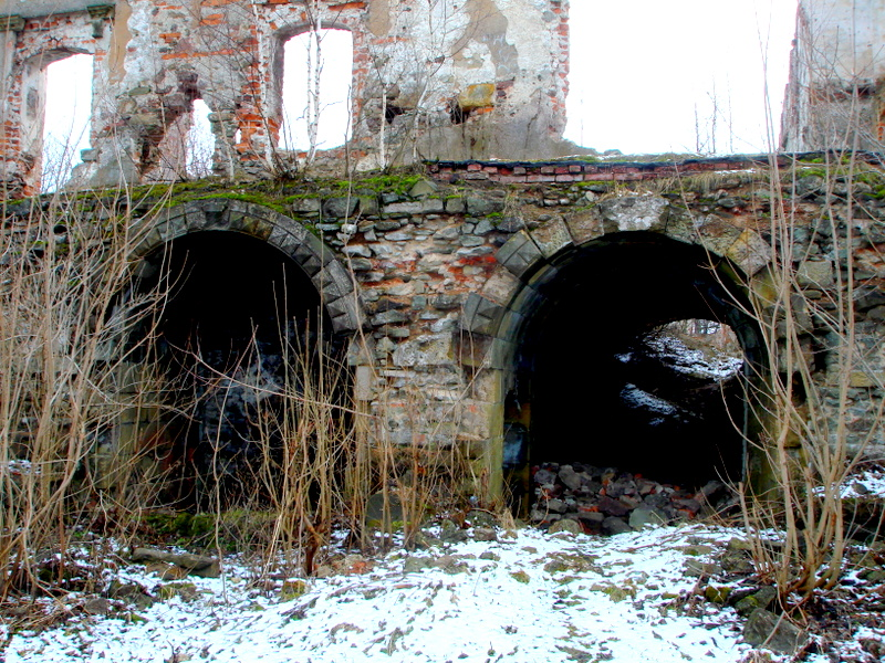 Kamienna Góra, Grodztwo, ruiny zamku